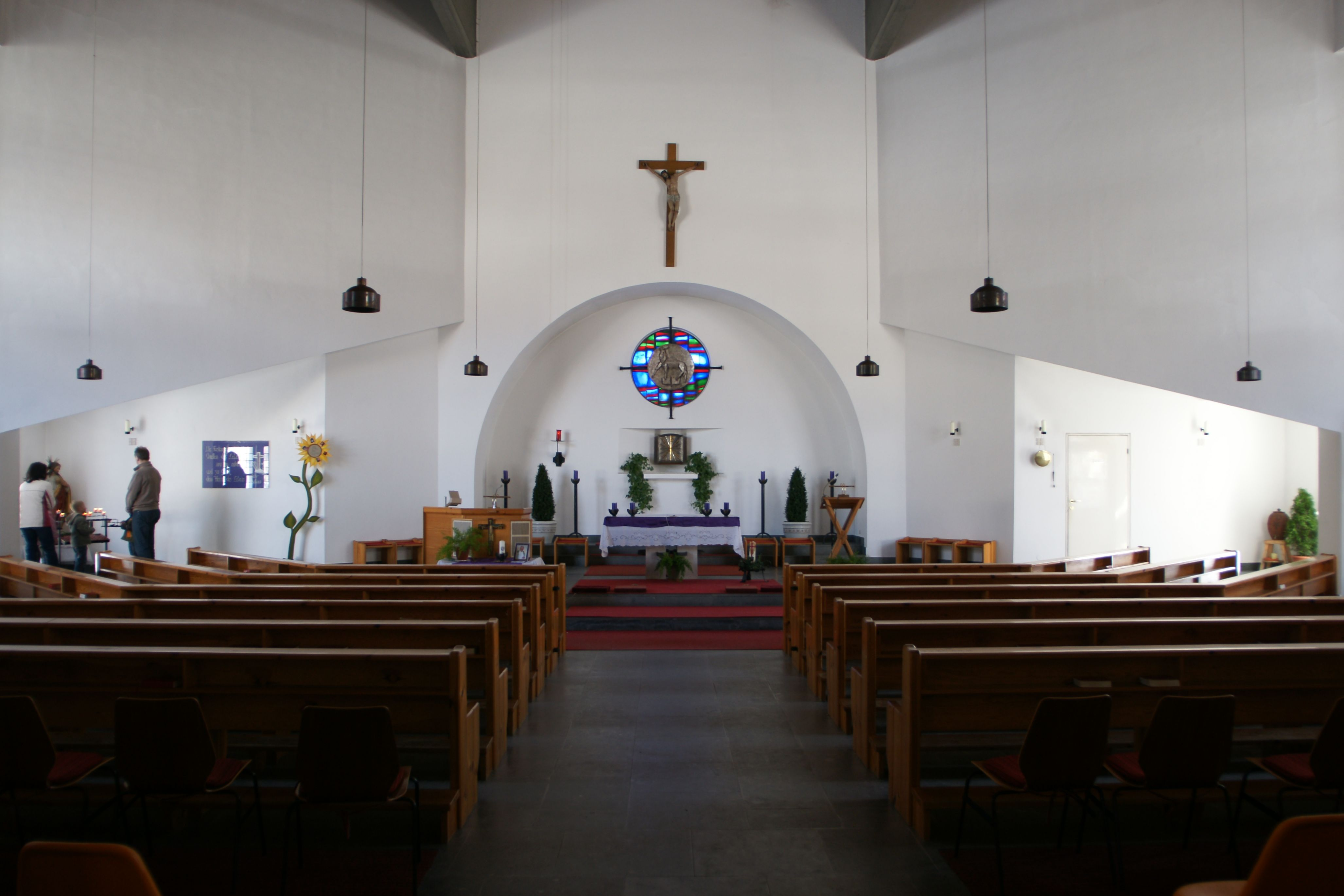 Pfarrkirche St. Rupert in Pertisau, erbaut in den Jahren 1966-68 nach Plänen von Clemens Holzmeister.